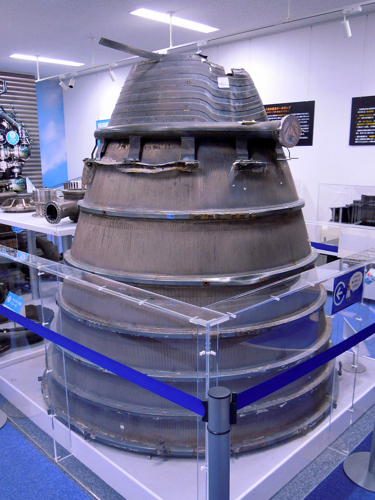 宇宙航空研究開発機構（JAXA）の角田宇宙センター・宇宙開発展示室に展示されているH-IIロケット8号機LE-7エンジン